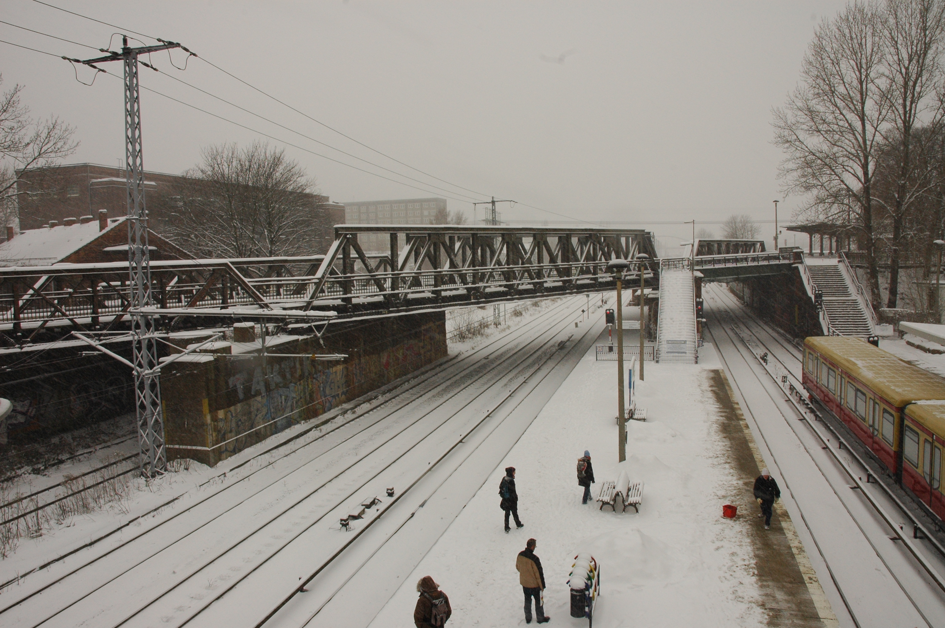 Vue de la station de S-Bahn "Ostkreuz" sous la neige, à Berlin.